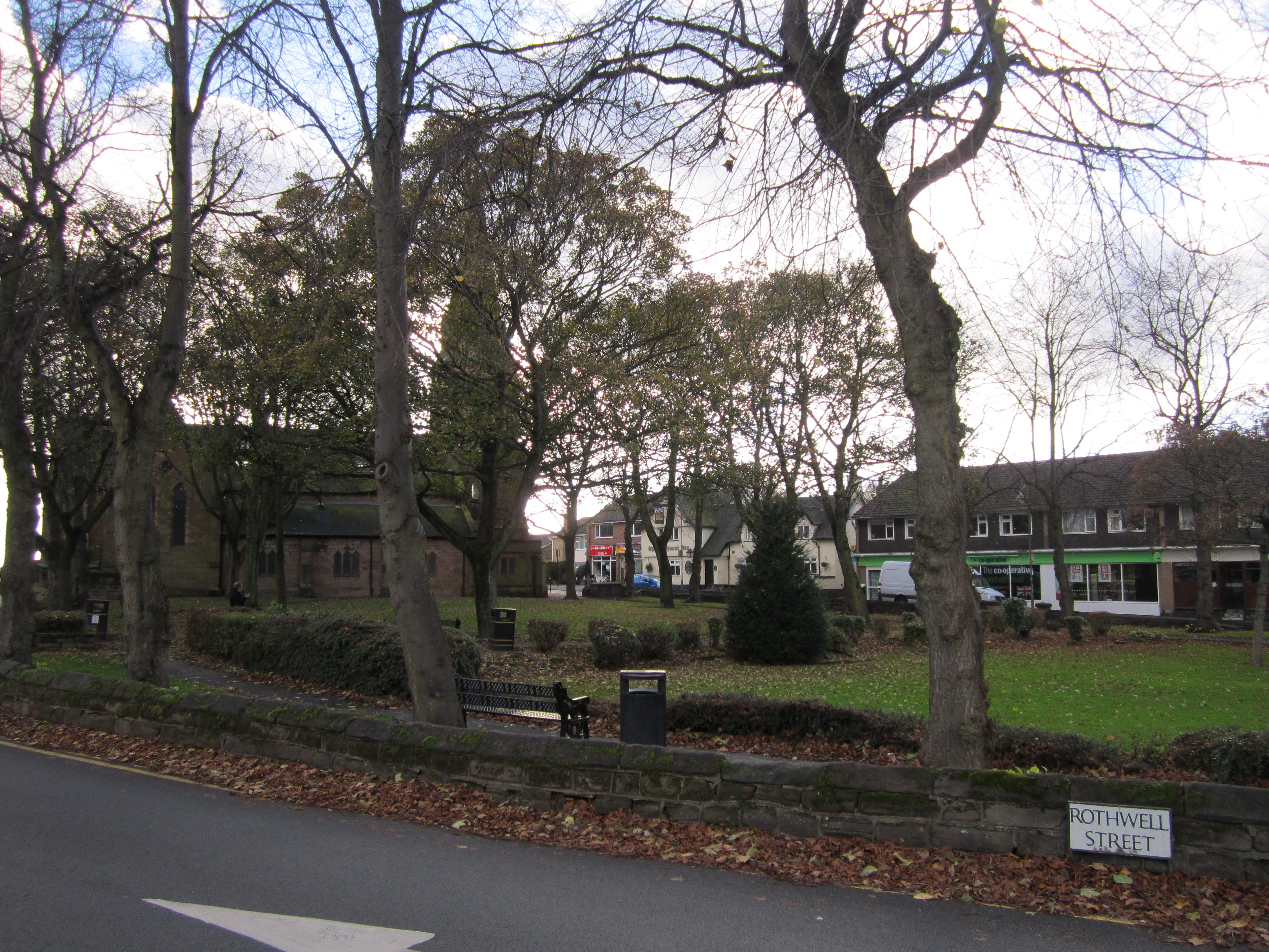 Penkhull, Stoke-on-Trent, England.